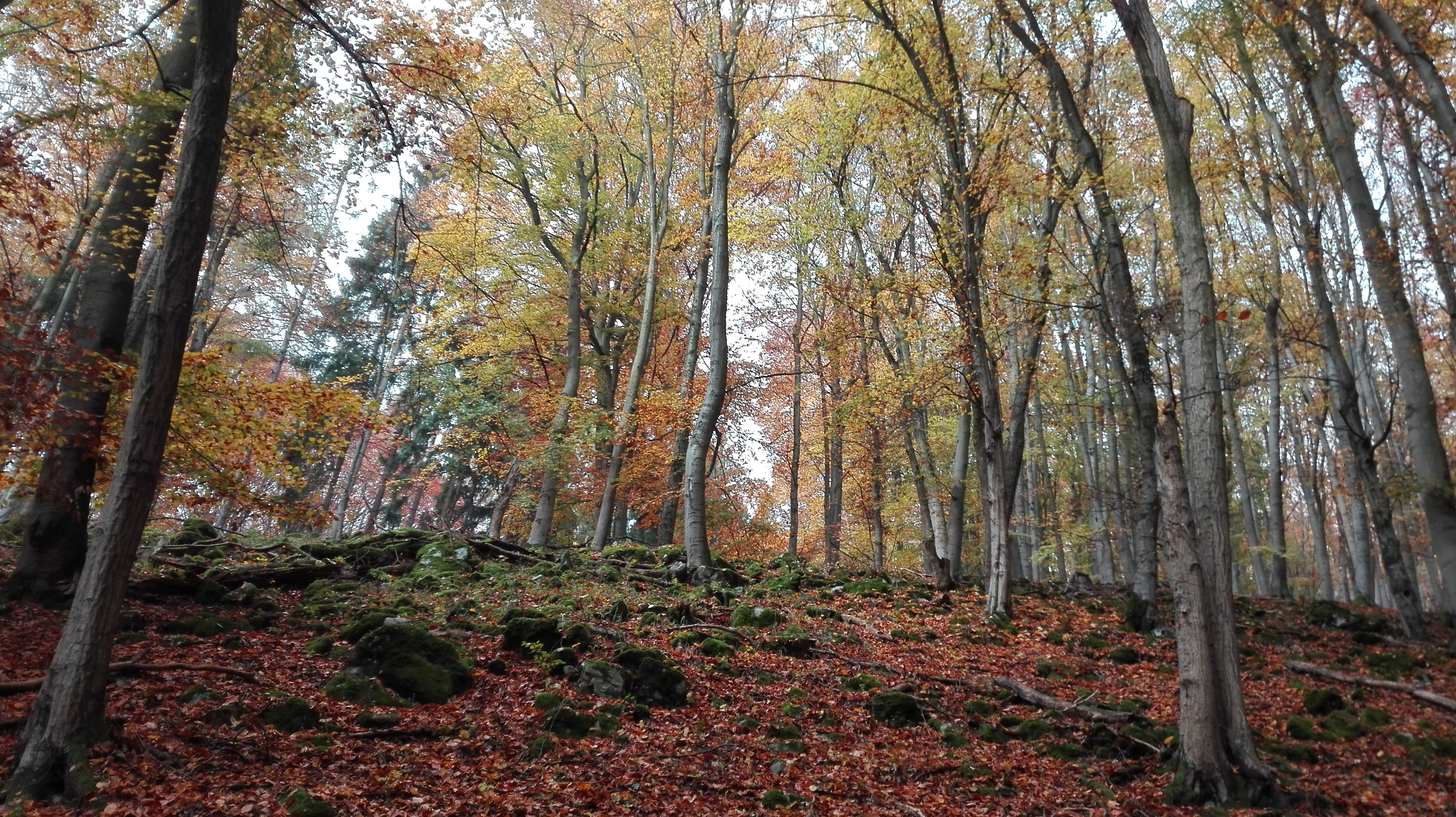 Typický porost